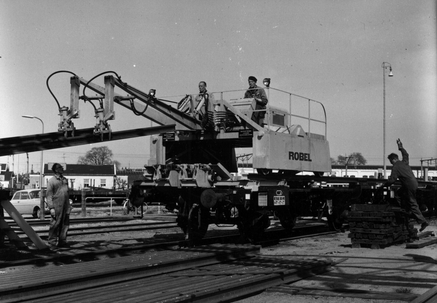 Afbeelding van het beladen van een trein (Robeltrein) met spoorstaven op het terrein van de Spoorstaaflasinrichting (SLI) van de N.S. te Utrecht.